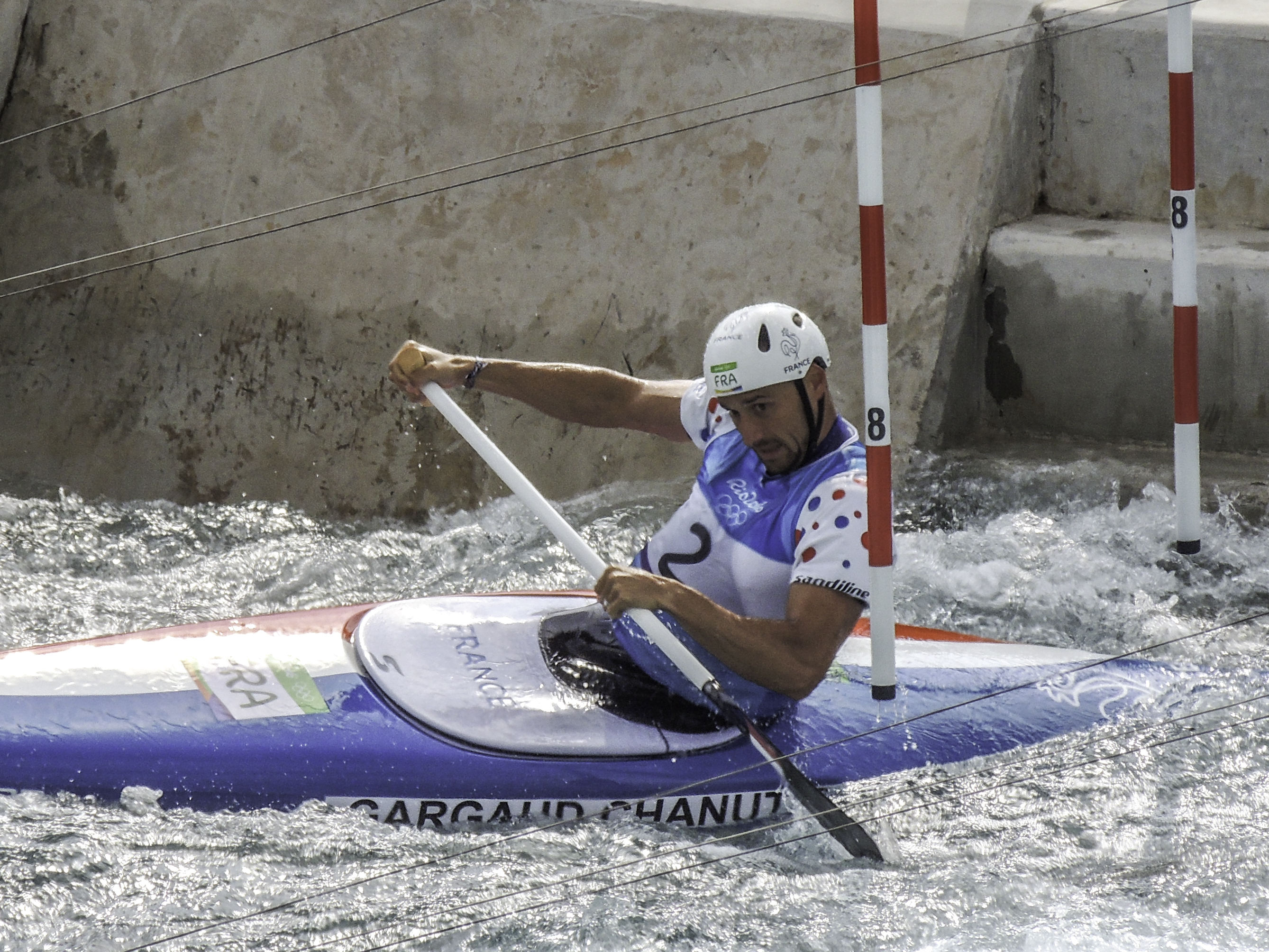 Denis Gargaud Chanut da França, nas provas classificatórias da canoagem slalom.